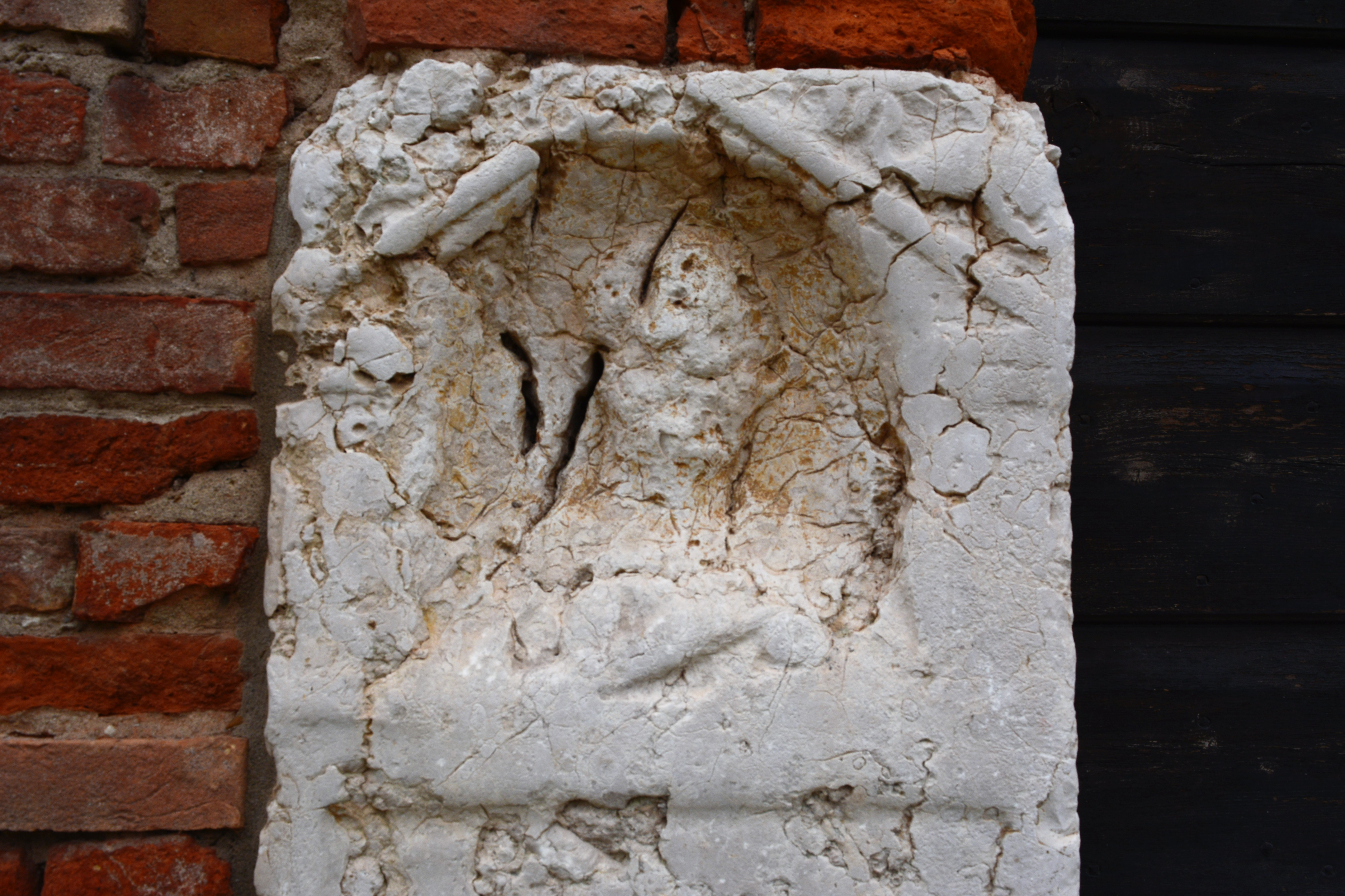 La cosiddetta zampata del diavolo